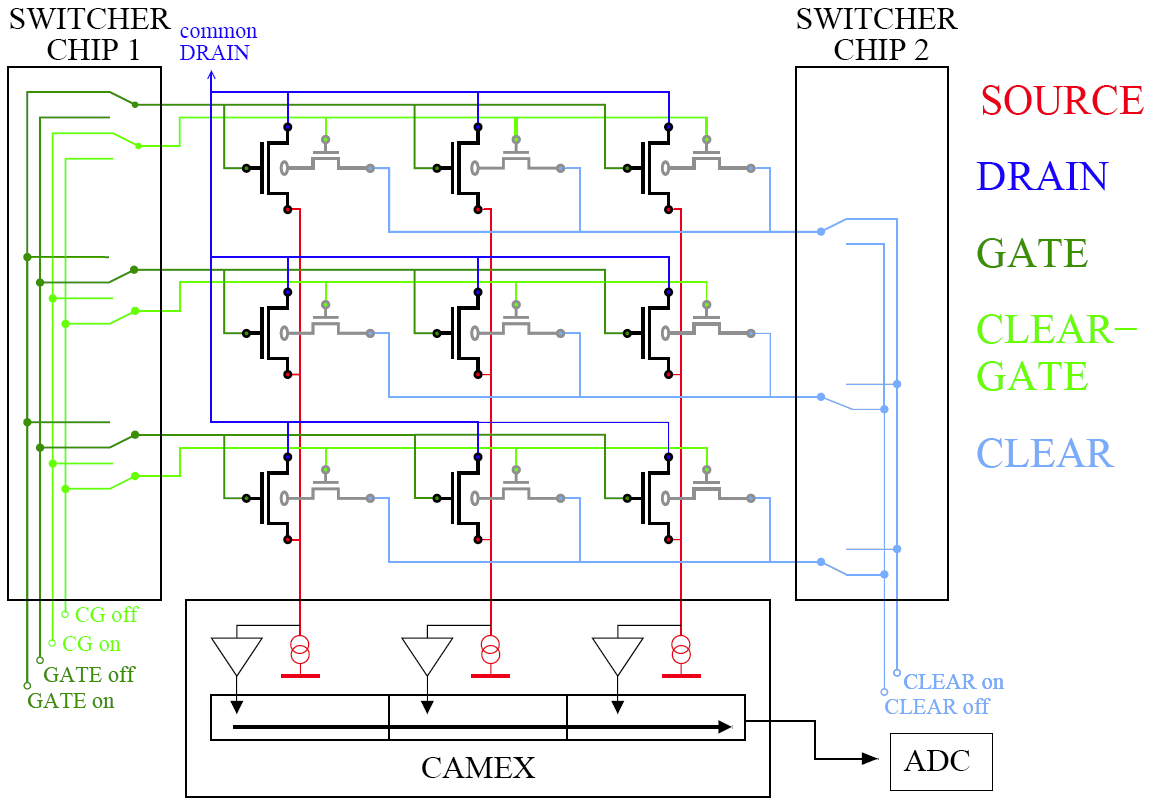 Abgebildet ist eine DePFET-Matrix bestehend aus 9 Pixel. Die Steuerung erfolgt über zwei SWITCHER Chips, das Auslesen der Bildinformationen geschieht über einen weiteren Baustein (hier CAMEX).